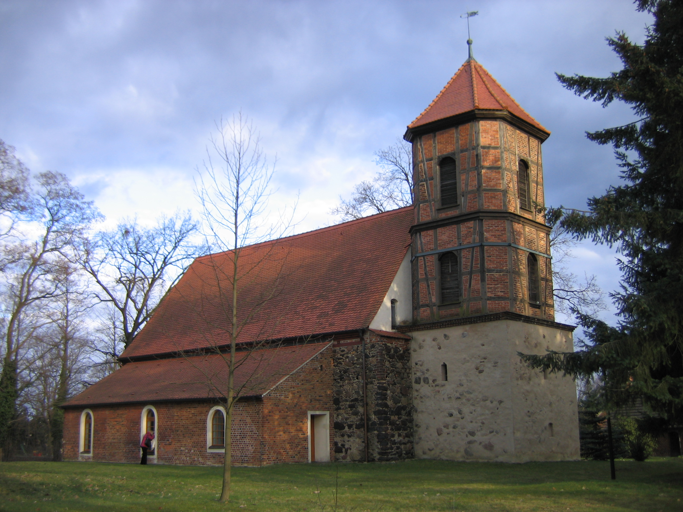 Dorfkirche in Eichwege, Spree-Neiße-Kreis, Brandenburg, Deutschland Parish church Eichwege, Spree-Neiße County, Brandenburg, Germany